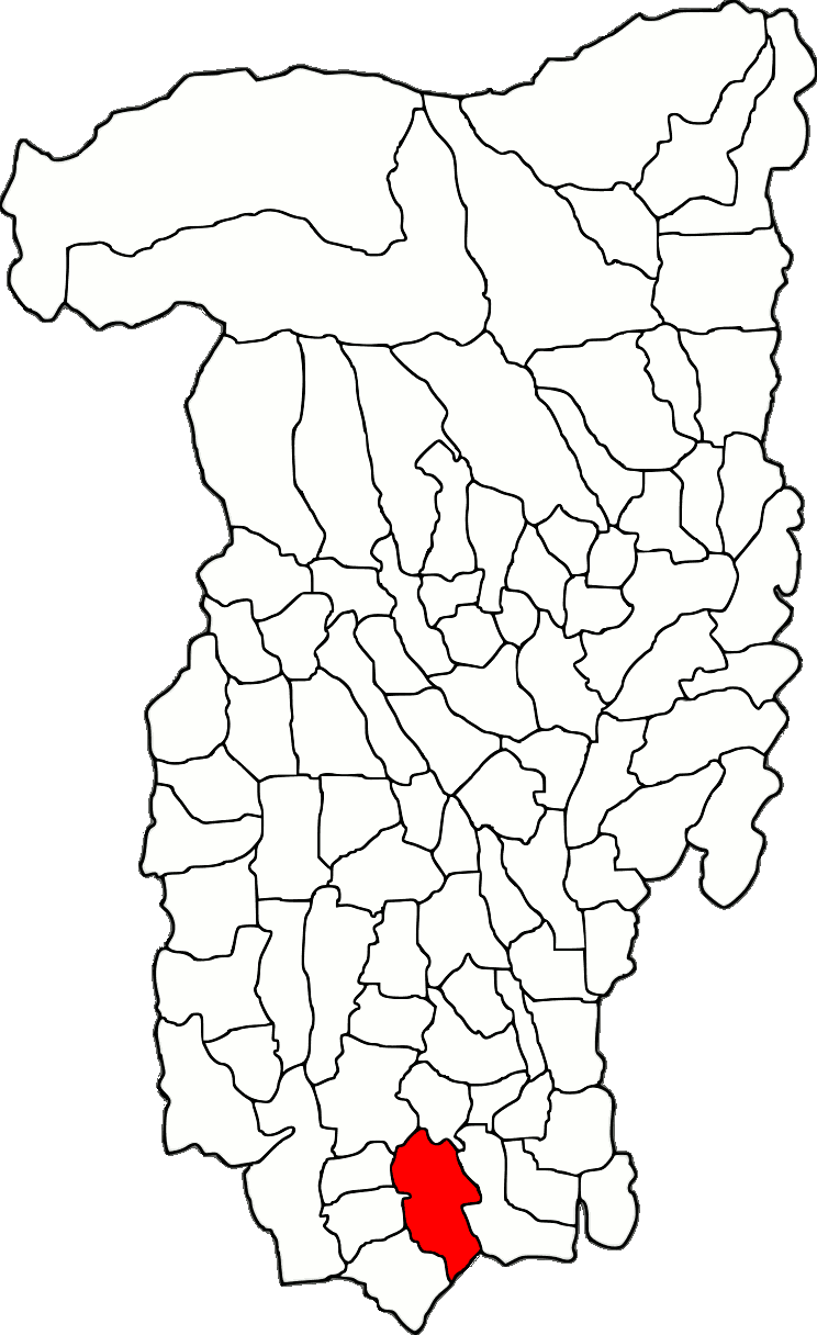 Lage der Gemeinde Șușani im Kreis Vâlcea (RO).